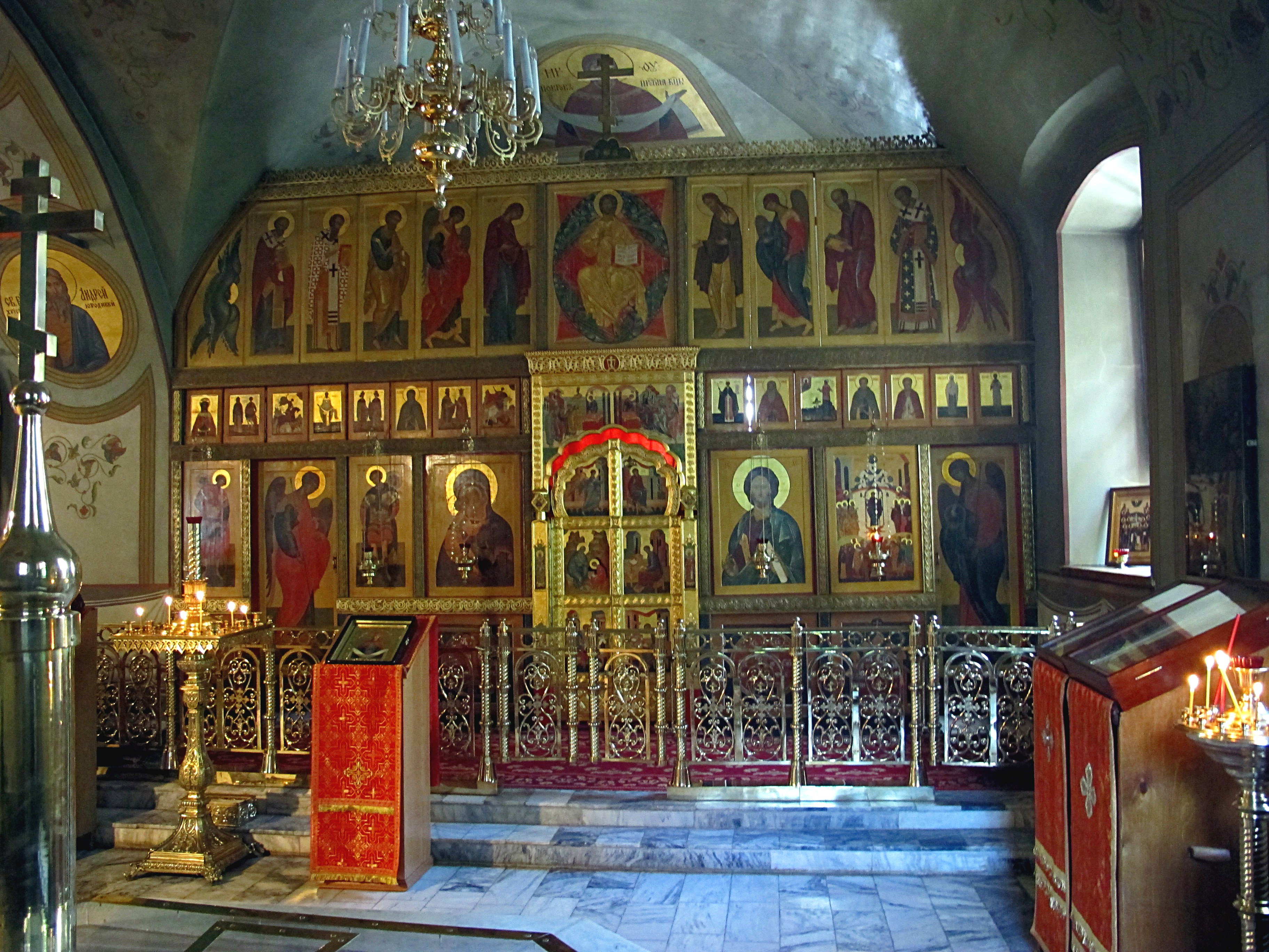 2011-05-12 Иконостас южного придела Храма Живоначальной Троицы в Листах